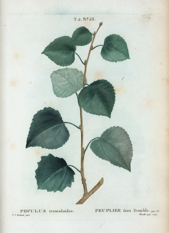 Populus tremuloides = Peuplier faux Tremble.